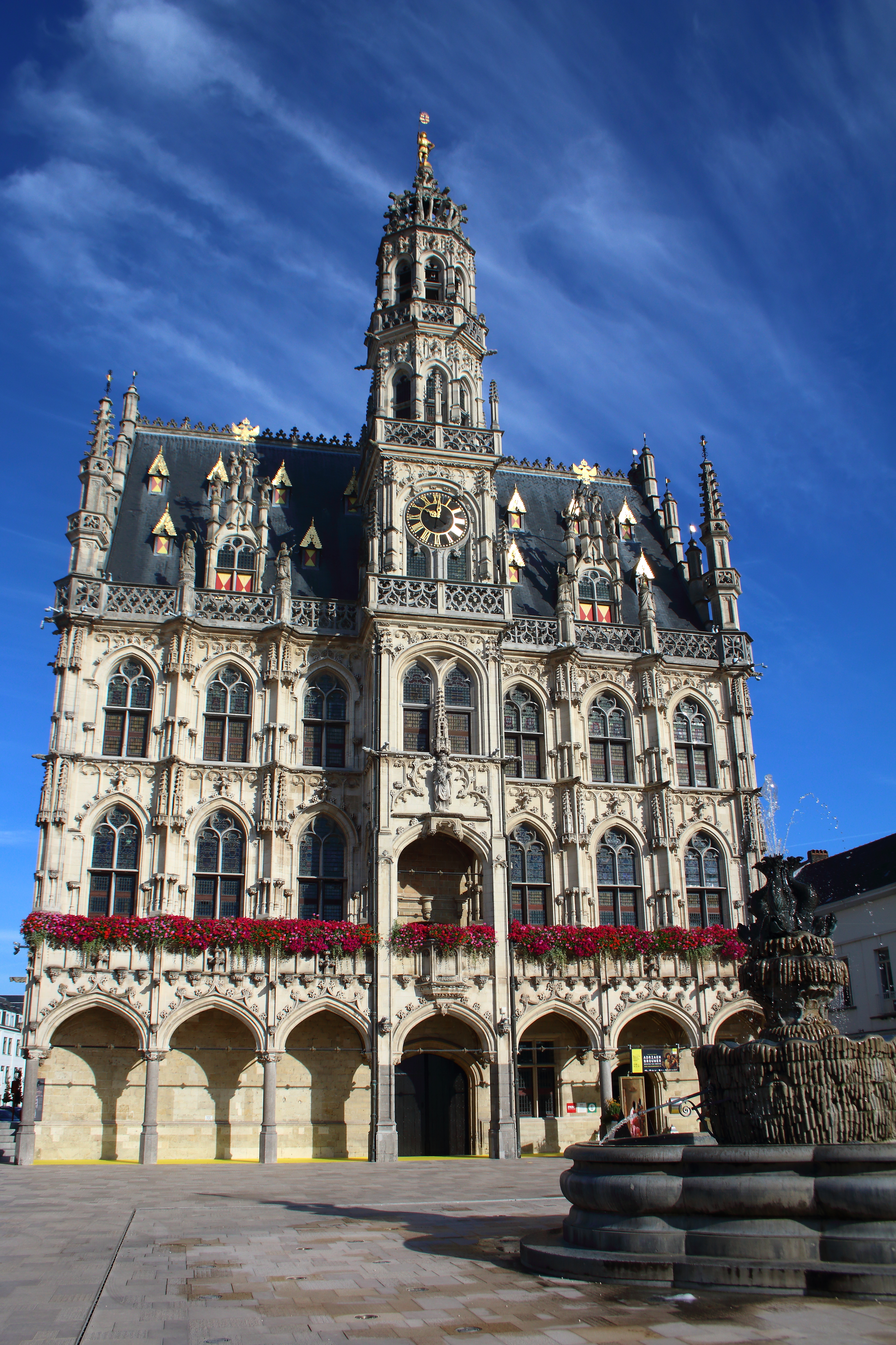 stadhuis, Oudenaarde, Vlaanderen, België